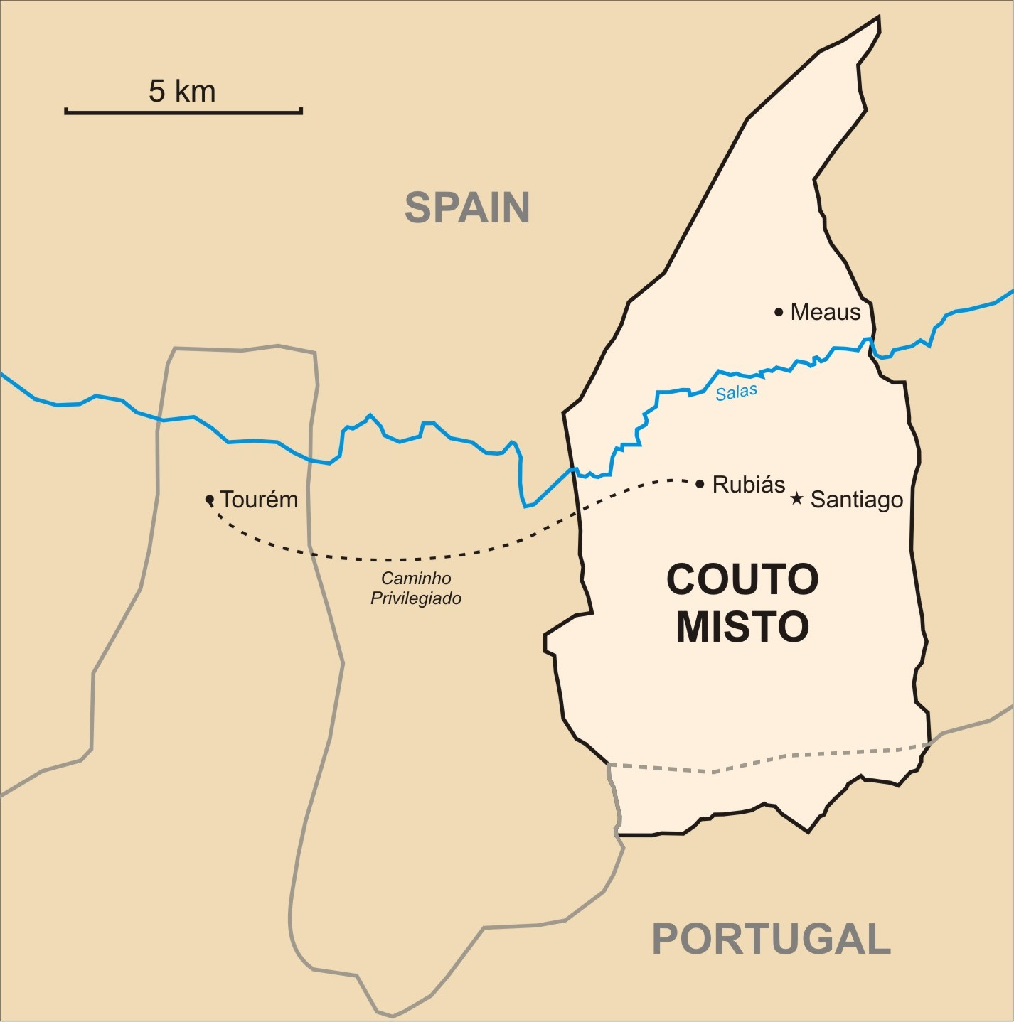 Couto Mixto.